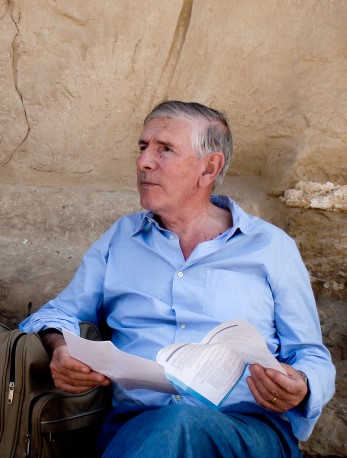 Professeur Louis de Bonis lisant